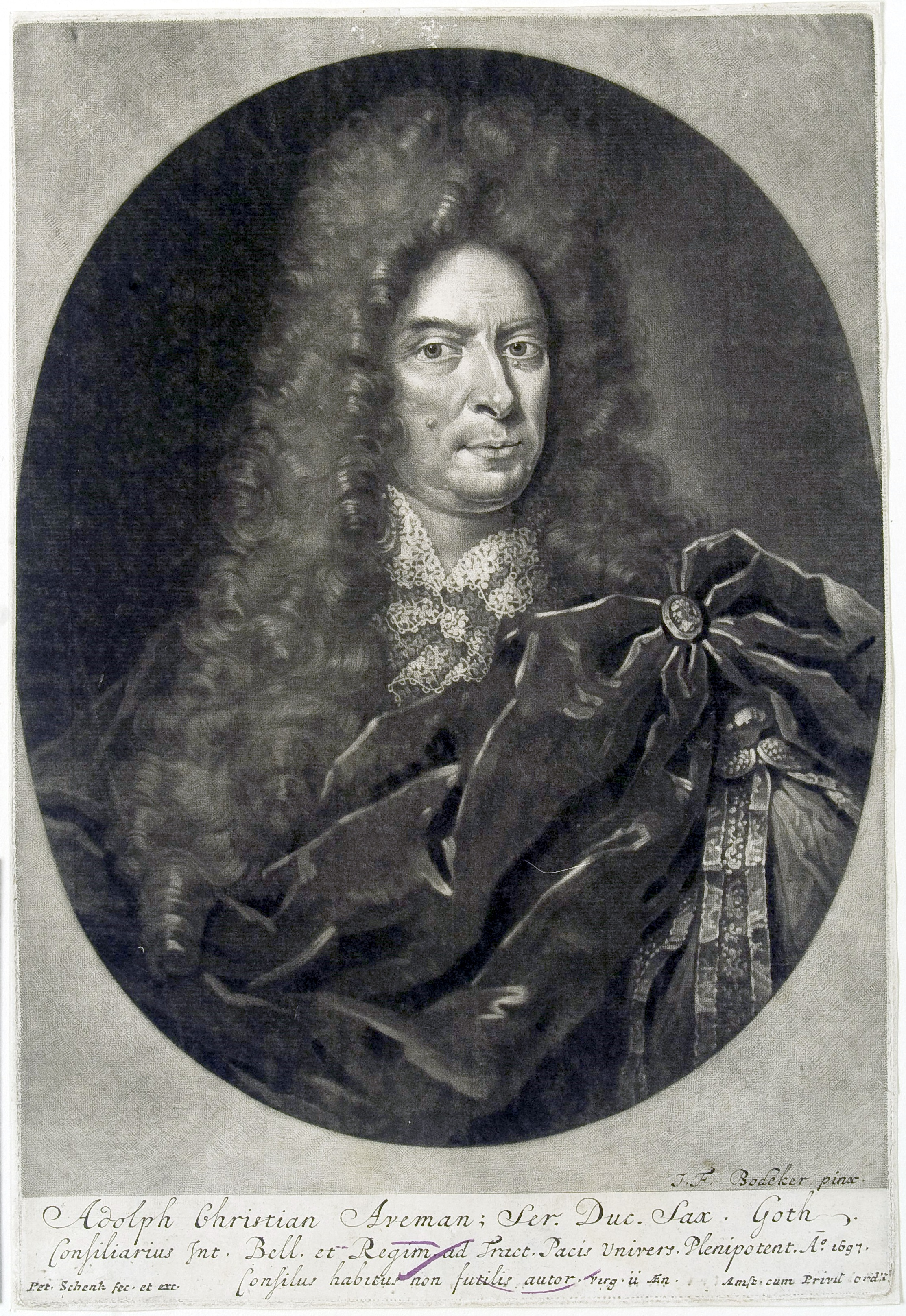 Brustb., Kopf nach r. gewandt, in Oval innerhalb Rechteck. Unten 2zeil. lat. Legende „Adolph Christian Avemann; Ser[enissimi] Duc[is] Sax[onico-] Goth[ani] | Consiliarius Int[imus] Bell[icus] et Regim[inis] ad Tract[atus] Pacis Univers[alis] Plenipotent[iarius] Ao. 1697.“ Darunter Vergil-Zitat (Aen. 11,339) „Consiliis habitus non futilis autor“.